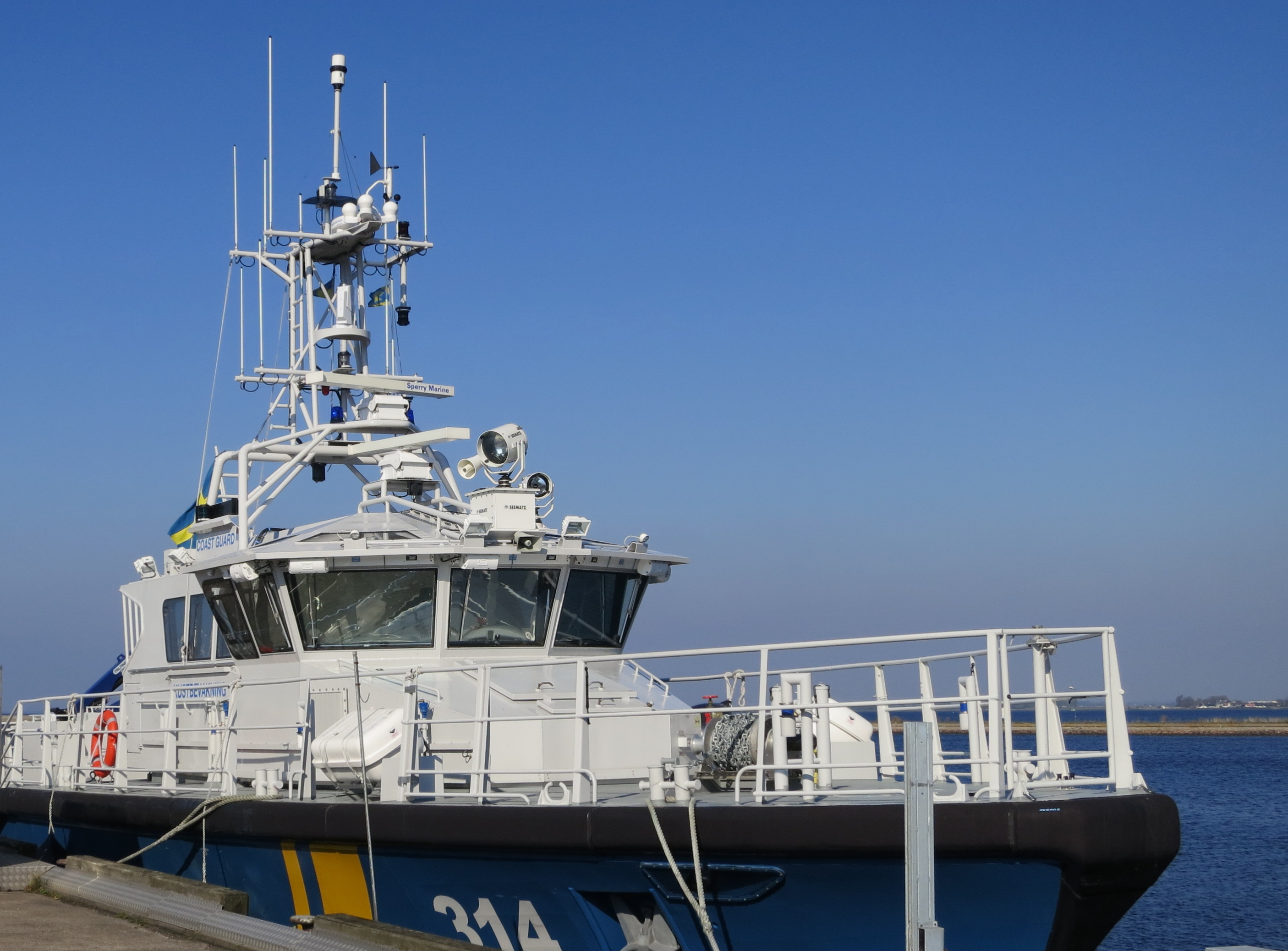 Kustbevakningsfartyget KBV 314 vid kaj